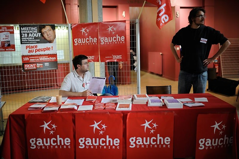 Journées "Remues-ménages" du Parti de gauche, à Grenoble (France) à la fin août 2011. Stand du parti Gauche unitaire.